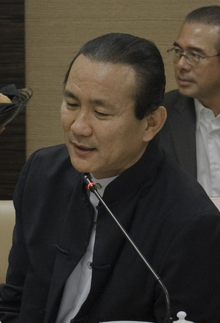 นายกรัฐมนตรี เป็นประธานการประชุมผู้บริหารระดับสูงของภาคเอกชนพบนายกรัฐมนตรี พร้อมร่วมรับประทานอาหารกลางวัน ณ อาคารจามจุรีสแควร์ เขตปทุมวัน กรุงเทพฯ วันเสาร์ที่ 26 กุมภาพันธ์ พ.ศ.2554 (Photographer attached to the Prime Minister of the Kingdom of Thailand (H.E.Mr.Abhisit Vejjajiva) : Peerapat Wimolrungkarat / พีรพัฒน์ วิมลรังครัตน์) @is50mm